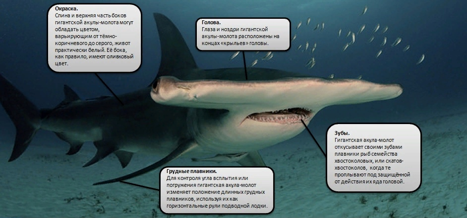 Некоторые анатомические особенности гигантской акулы-молота, или гигантской молот-рыбы (Sphyrna mokarran).Информация дана согласно книге Дэвида Элдертона «Животные. Все обитатели нашей планеты», стр. 351.